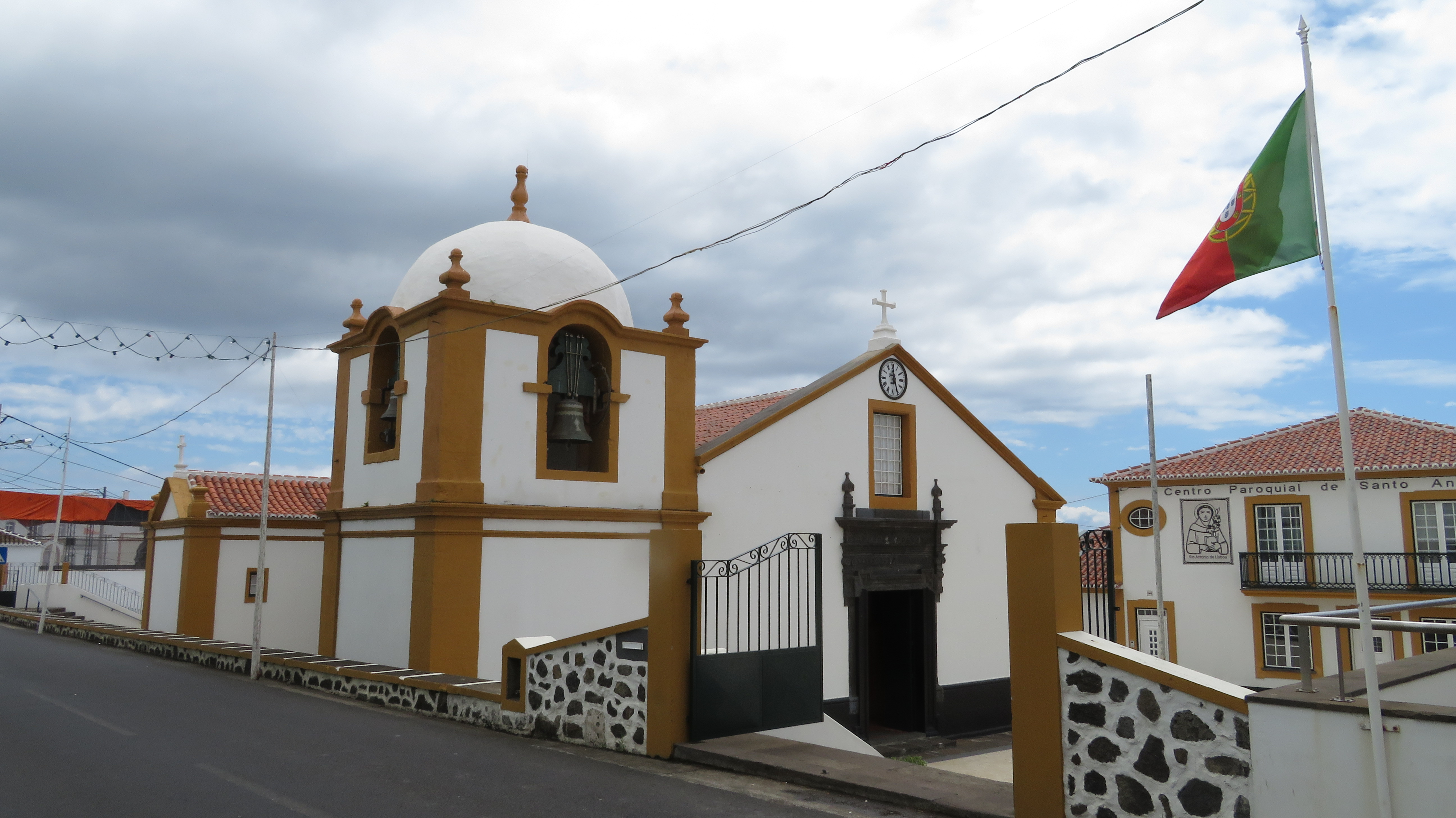 Igreja Paroquial Santo António de Porto Judeu, ilha Terceira, Acores, Portugal